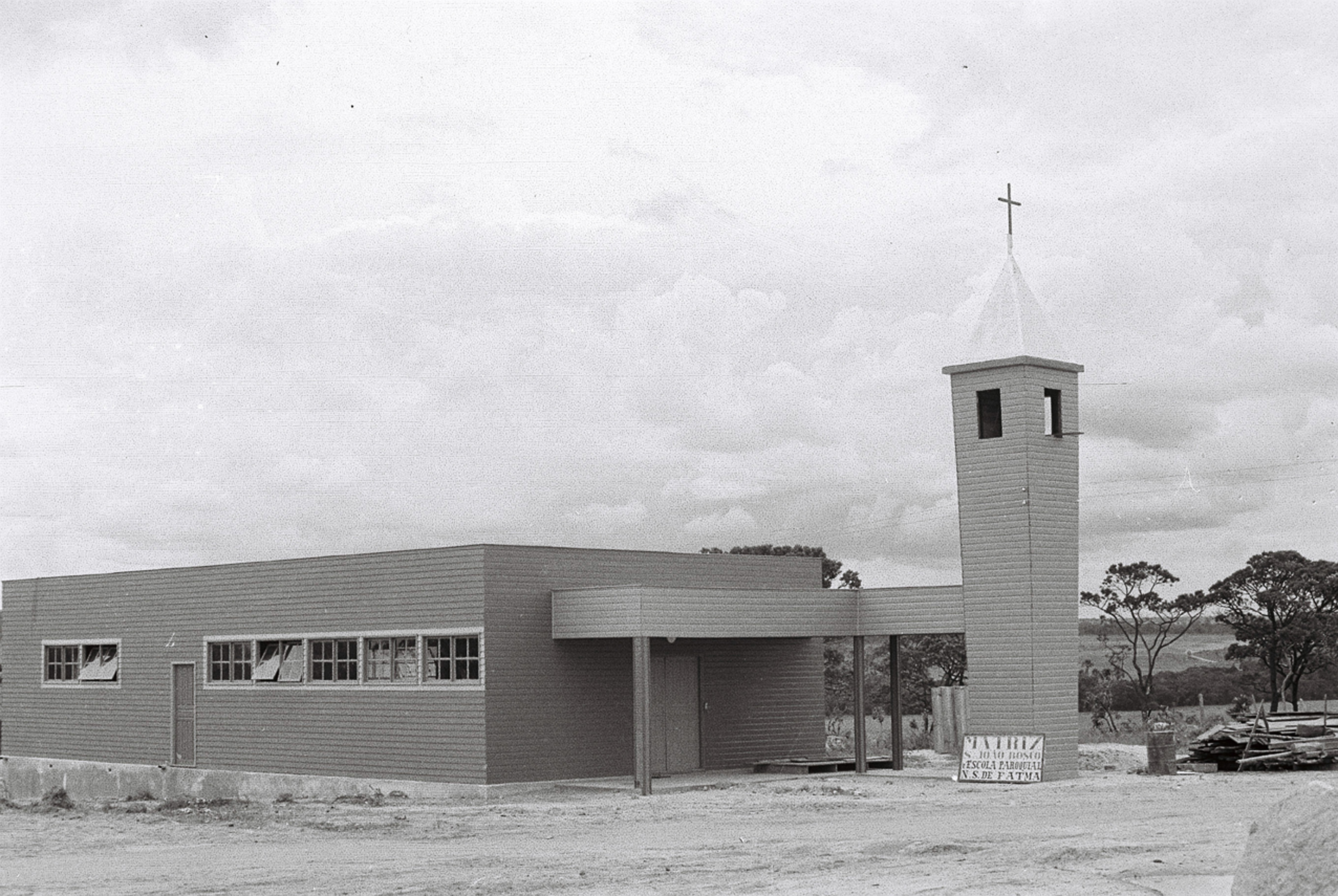 Primeira Igreja construída na Cidade Livre por obra do Pe. Roque na Paróquia Dom João Bosco em 1957. Fotografia atribuída a Mário Fontenelle pertencente ao acervo Arquivo Público do Distrito Federal